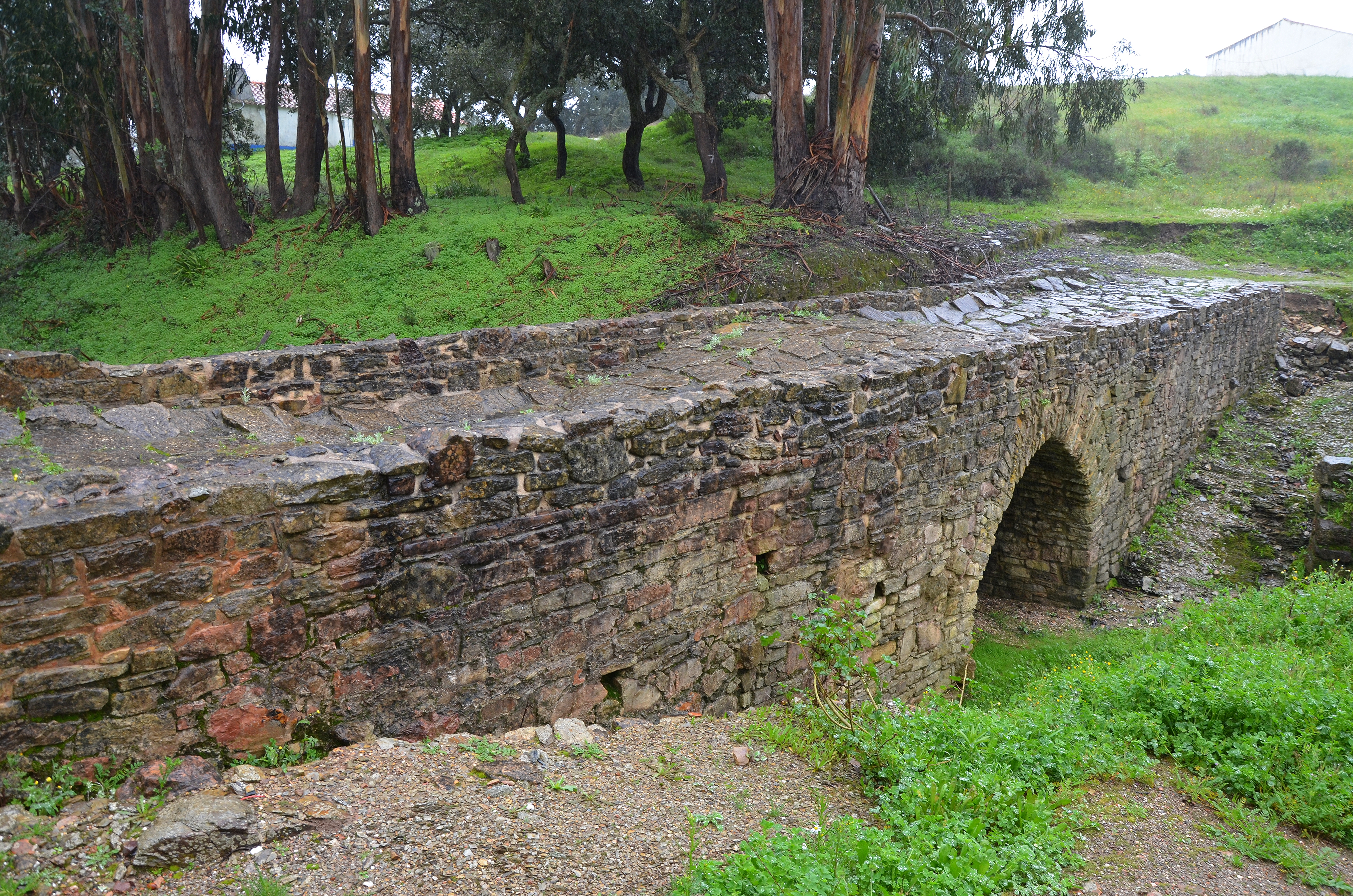 Roman bridge at Mirobriga, Lusitania, Portugal